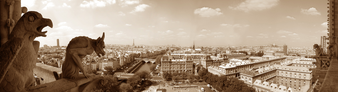 Panorama de Paris, vue du balcon du Cathédrale Notre-Dame de Paris